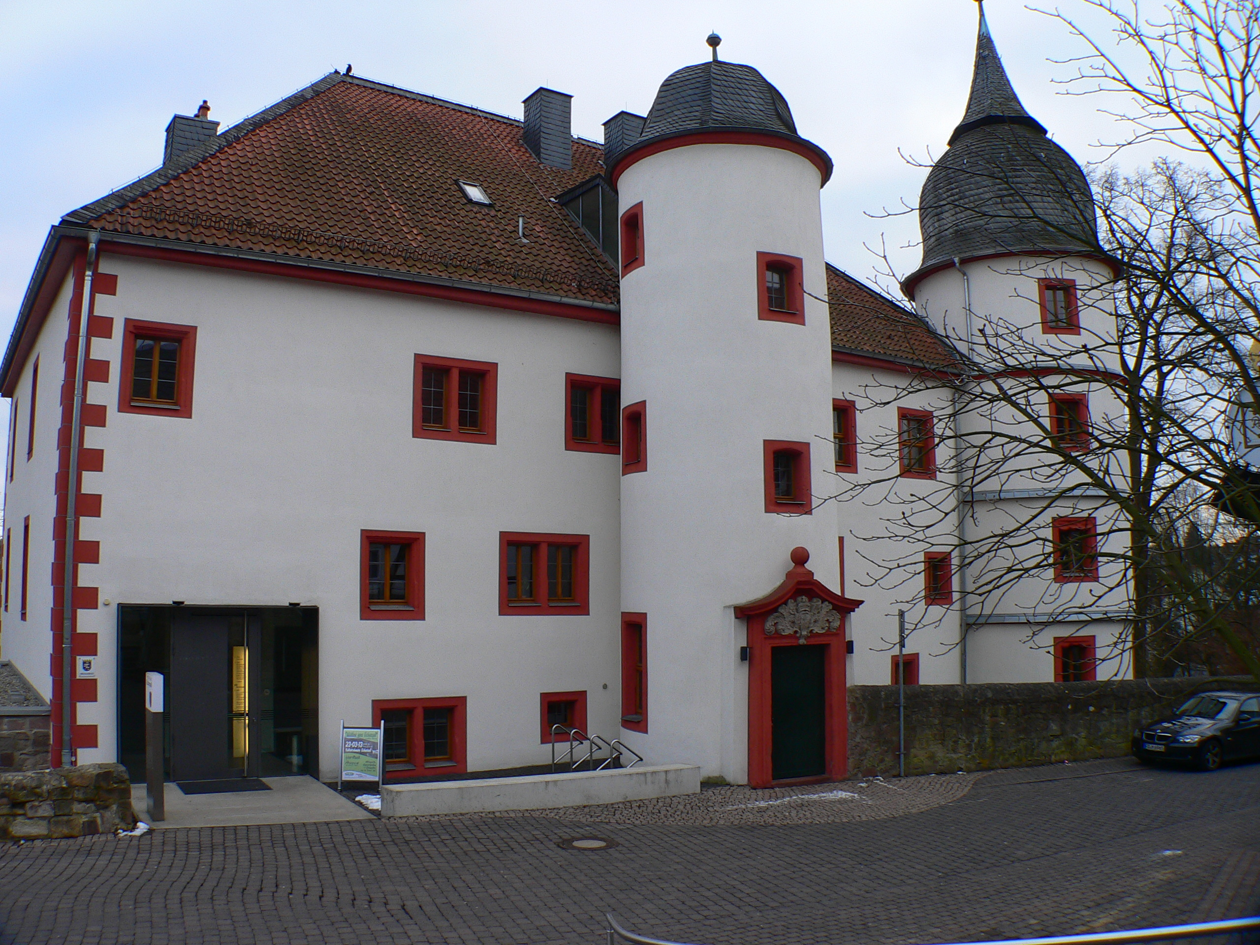 Eichenzeller Schlösschen in Eichenzell, Landkreis Fulda, Hessen.